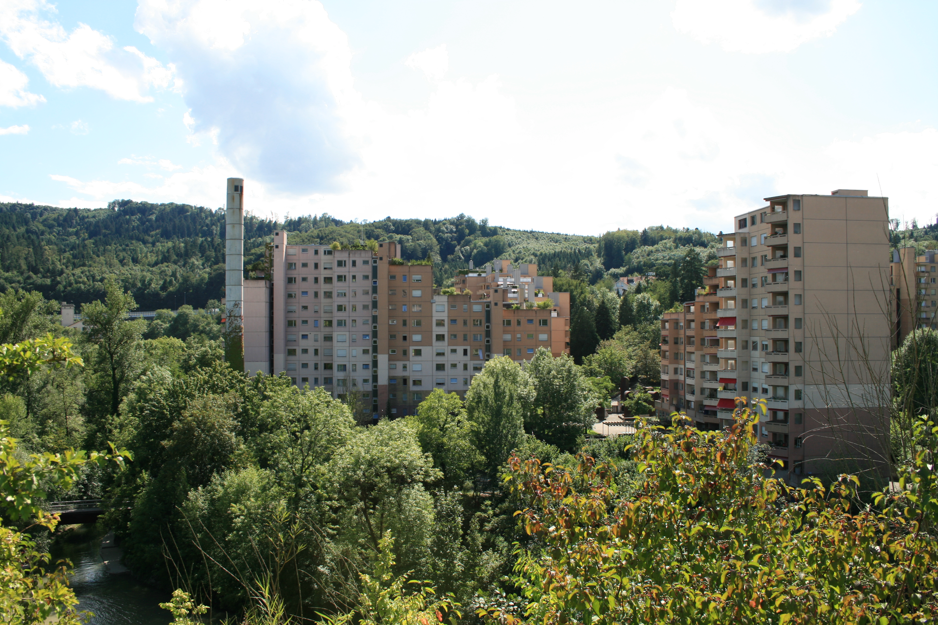 Webermühle, Neuenhof, Schweiz